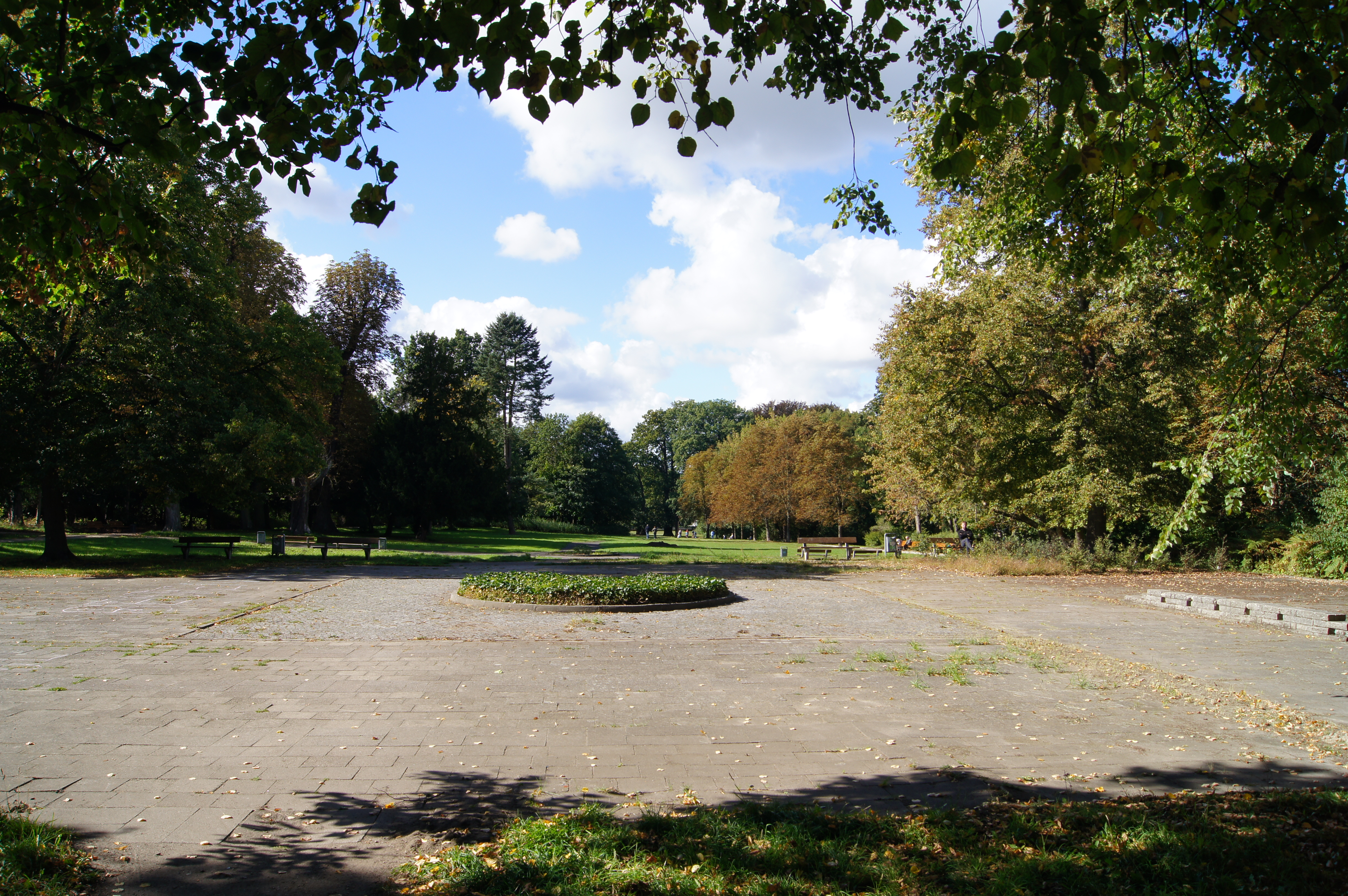 Schlosspark Berlin-BuchThis is a photograph of an architectural monument.